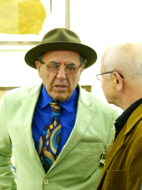 Javad Mojabi Iranian Journalist, Painter